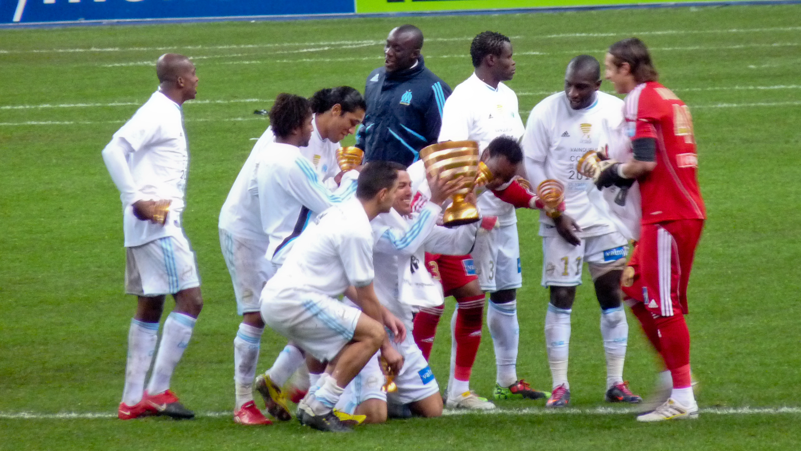 Finale de la coupe de la ligue - OM vs Bordeaux 3-1 - Stade de France - 27 mars 2010